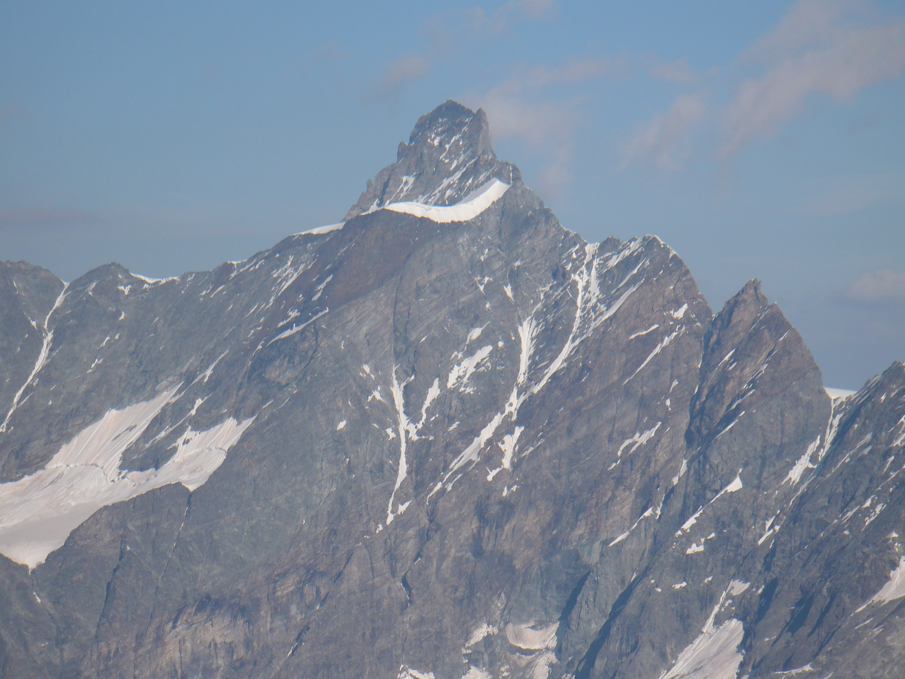 Dent d'Hérens visto dal Plateu Rosa - Alpi Pennine - Montagne dell'Italia - Montagne della Svizzera